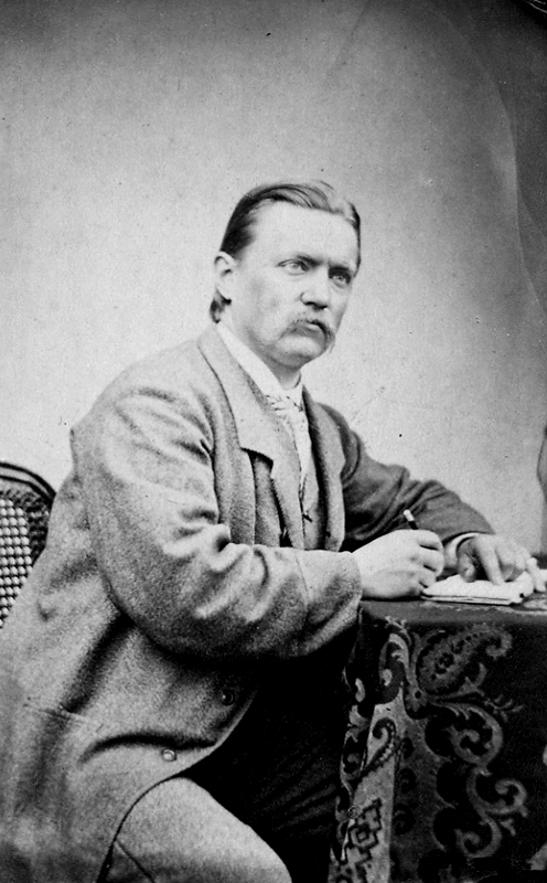 Ferdinand Fagerlin, konstnär, Wilhelmina Lagerholms lärare i Düsseldorf.